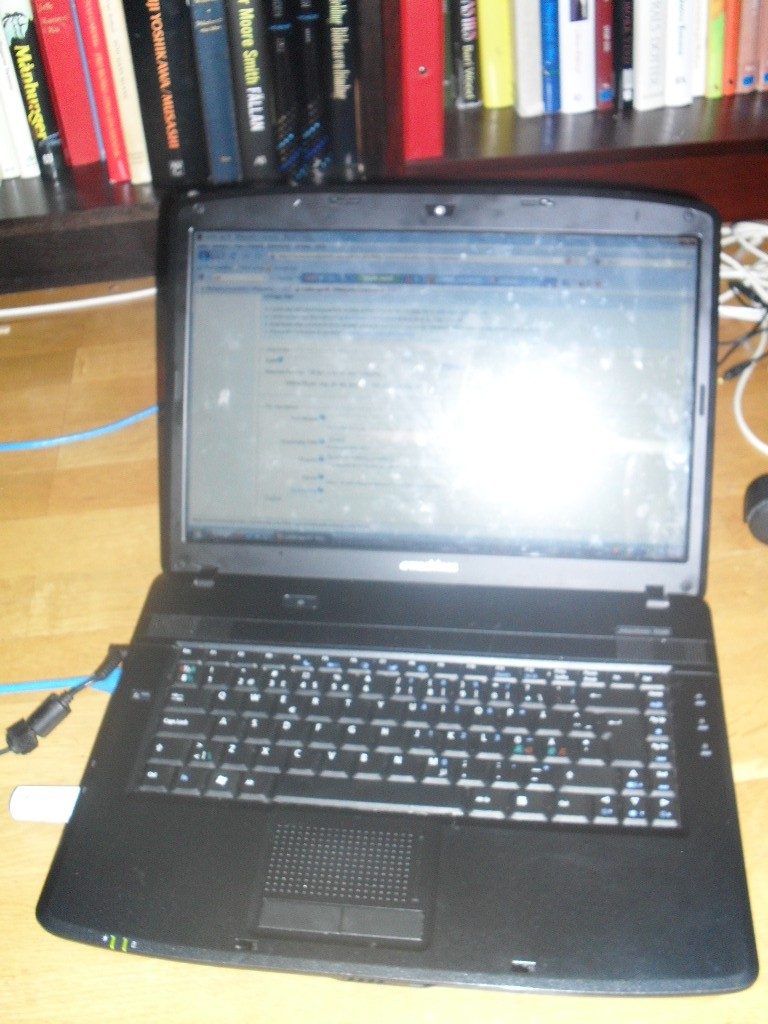 Emachines-dator